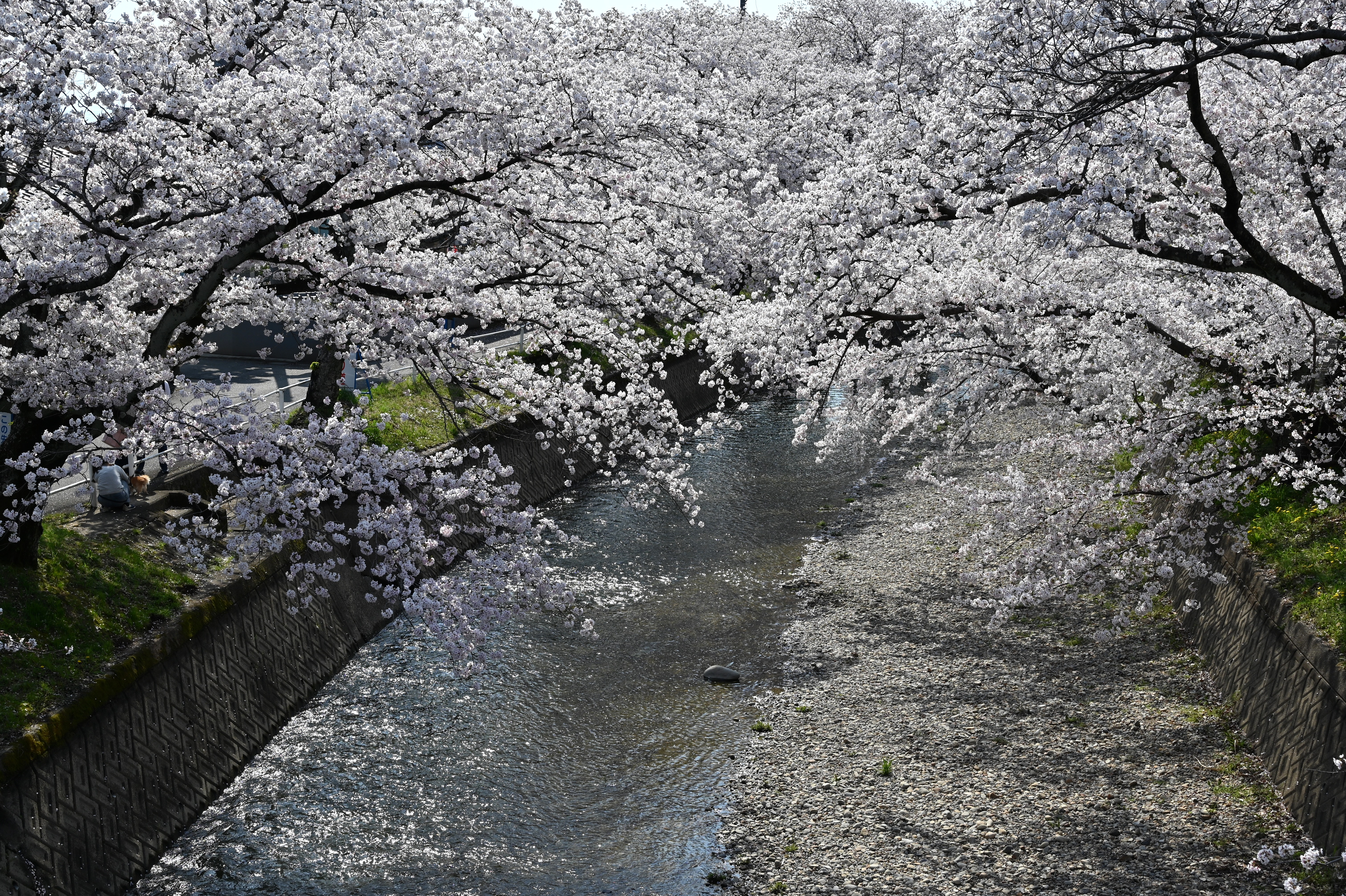 堀尾跡公園の裁断橋から見た五条川の桜並木